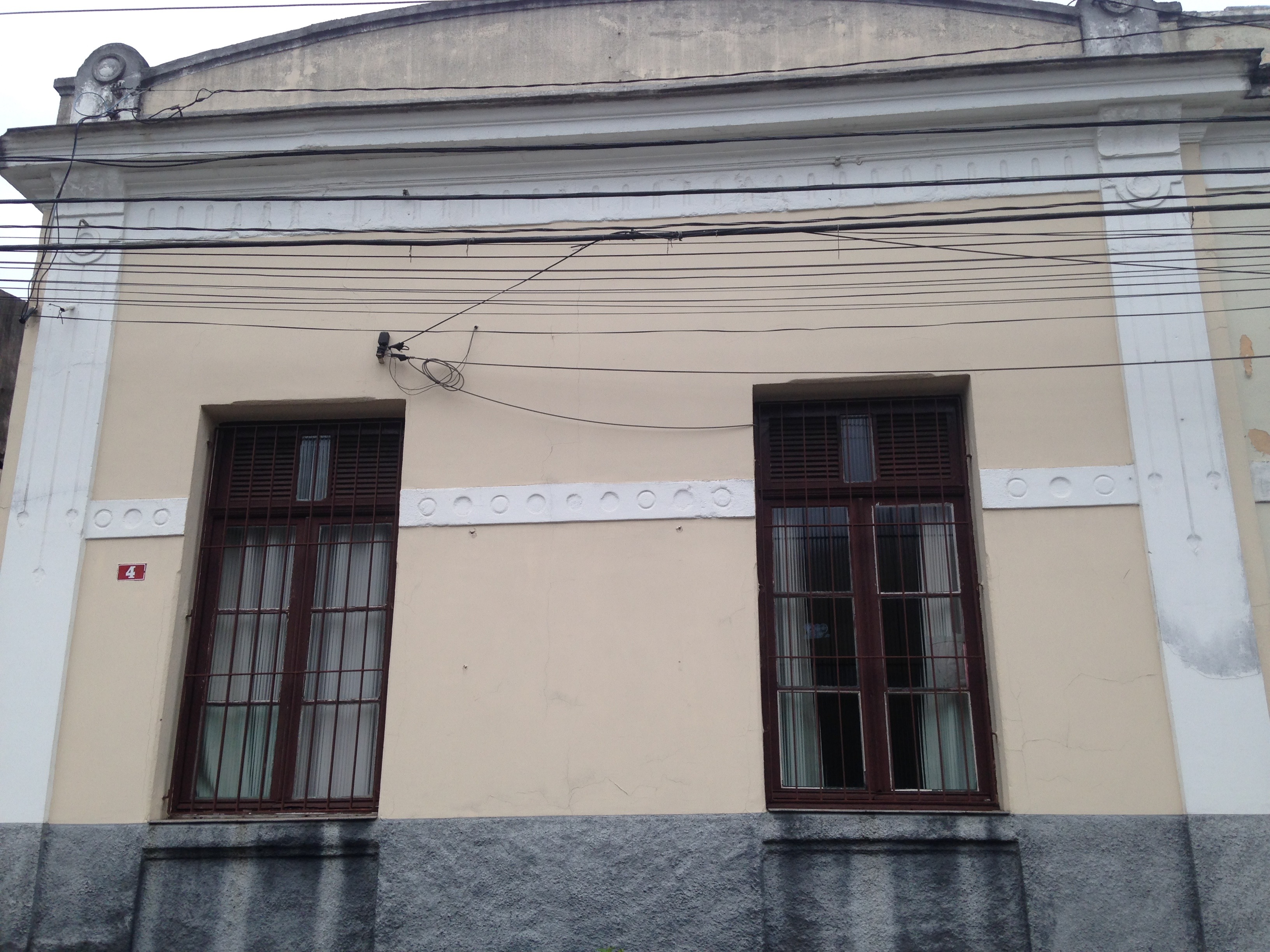 Detalhes em gesso das contruções na Vila Economizadora, em São Paulo (SP)